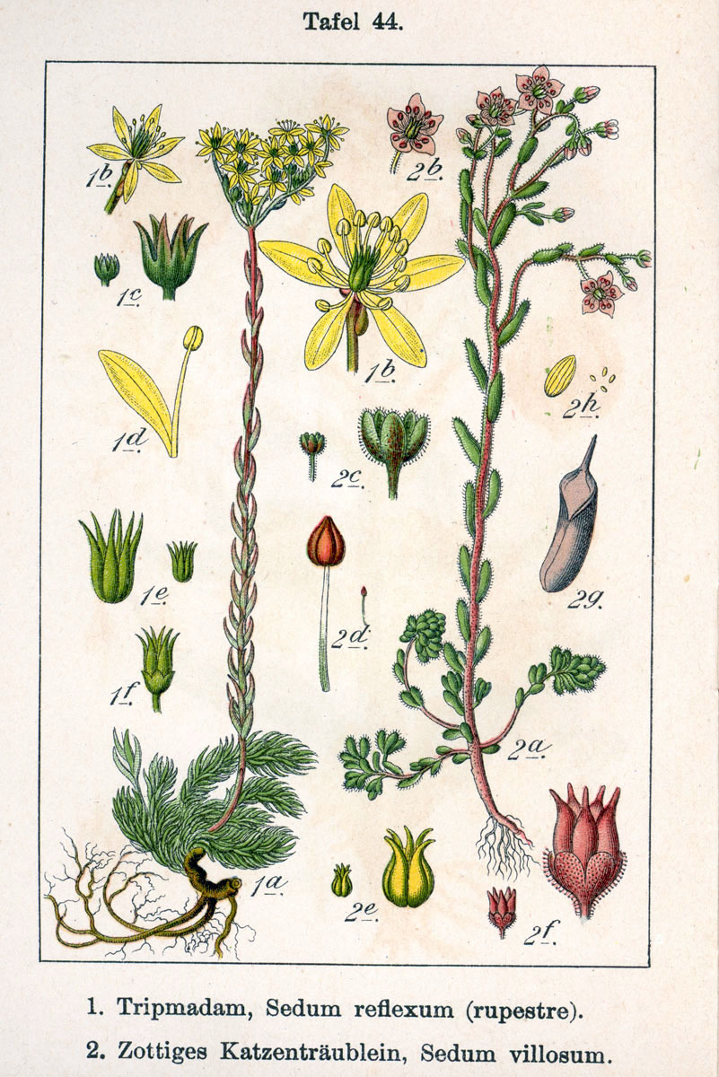 1. Sedum rupestre subsp. rupestre, syn. Sedum reflexum L. 2. Sedum villosum L. Original Description 1. Tripmadam, Sedum reflexum (rupestre) 2. Zottiges Katzenträublein, Sedum villosum